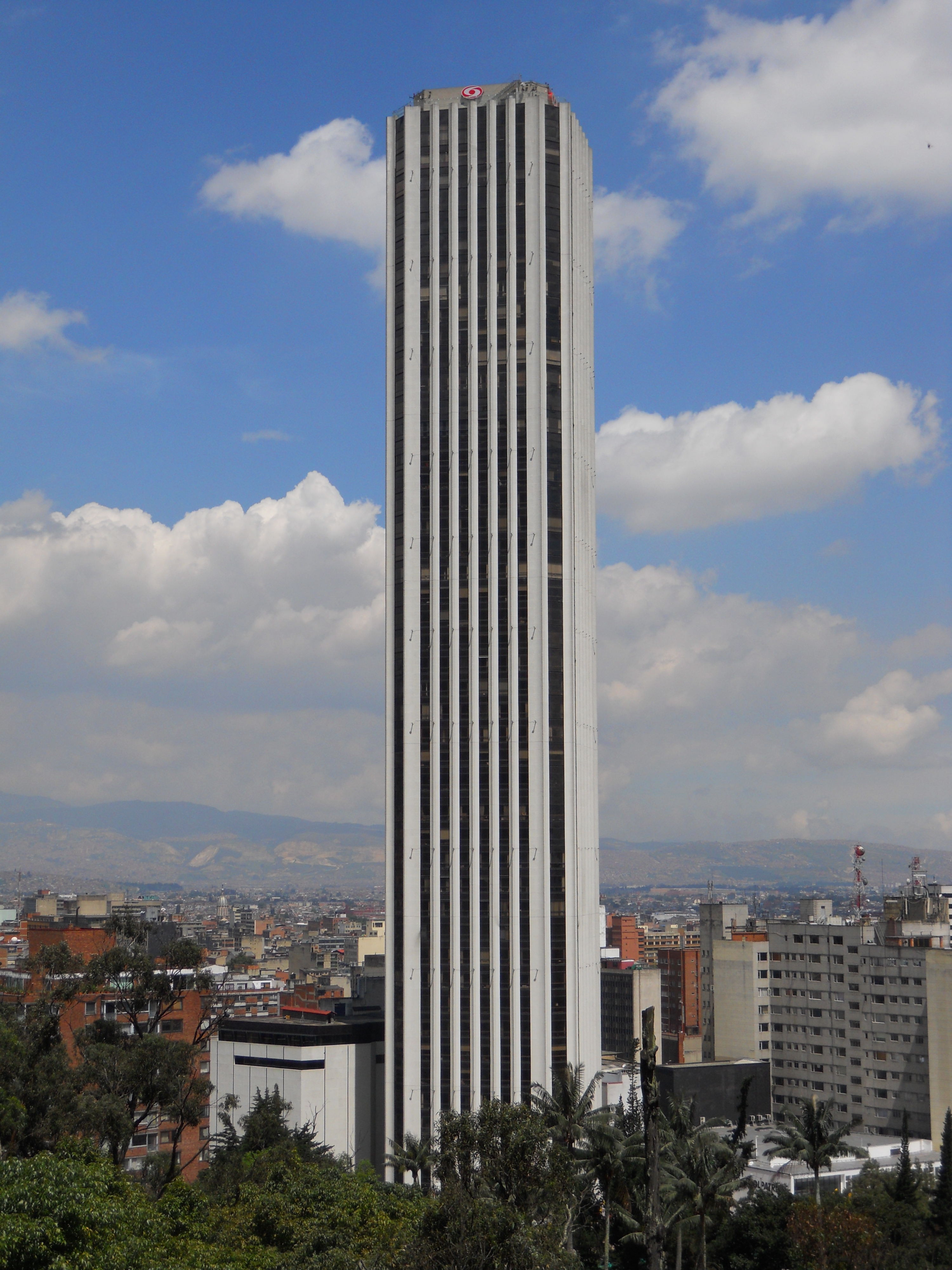 Costado suroriental de la torre Colpatria.